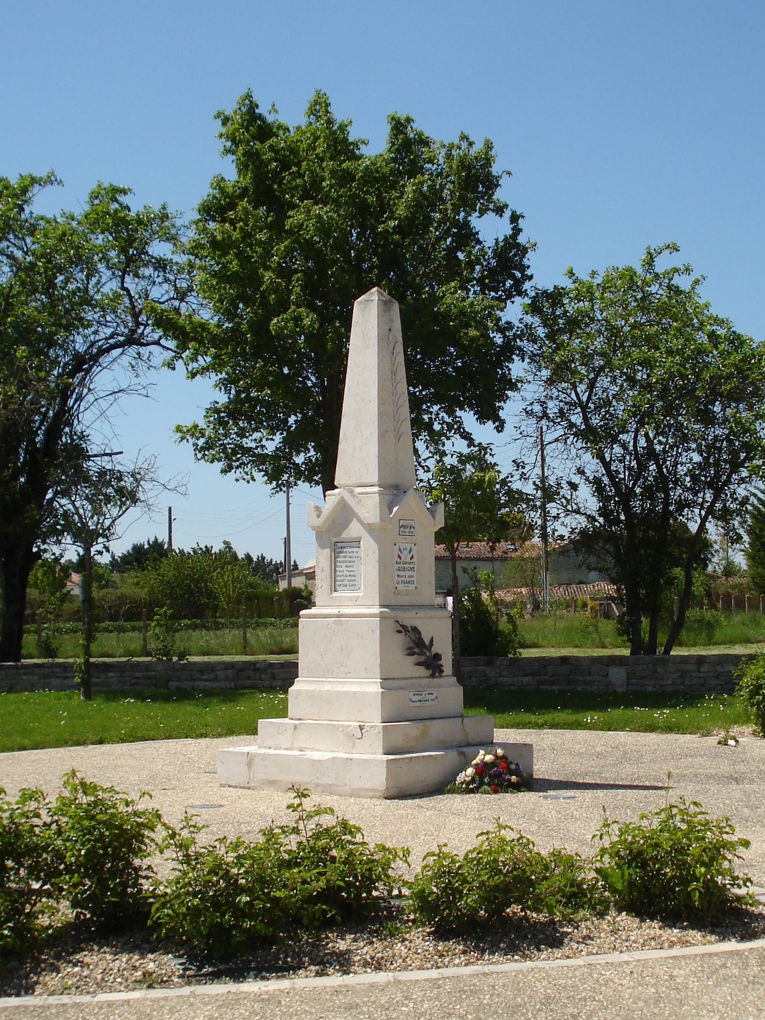 Le monument aux morts d'Aubigné (Deux-Sèvres)